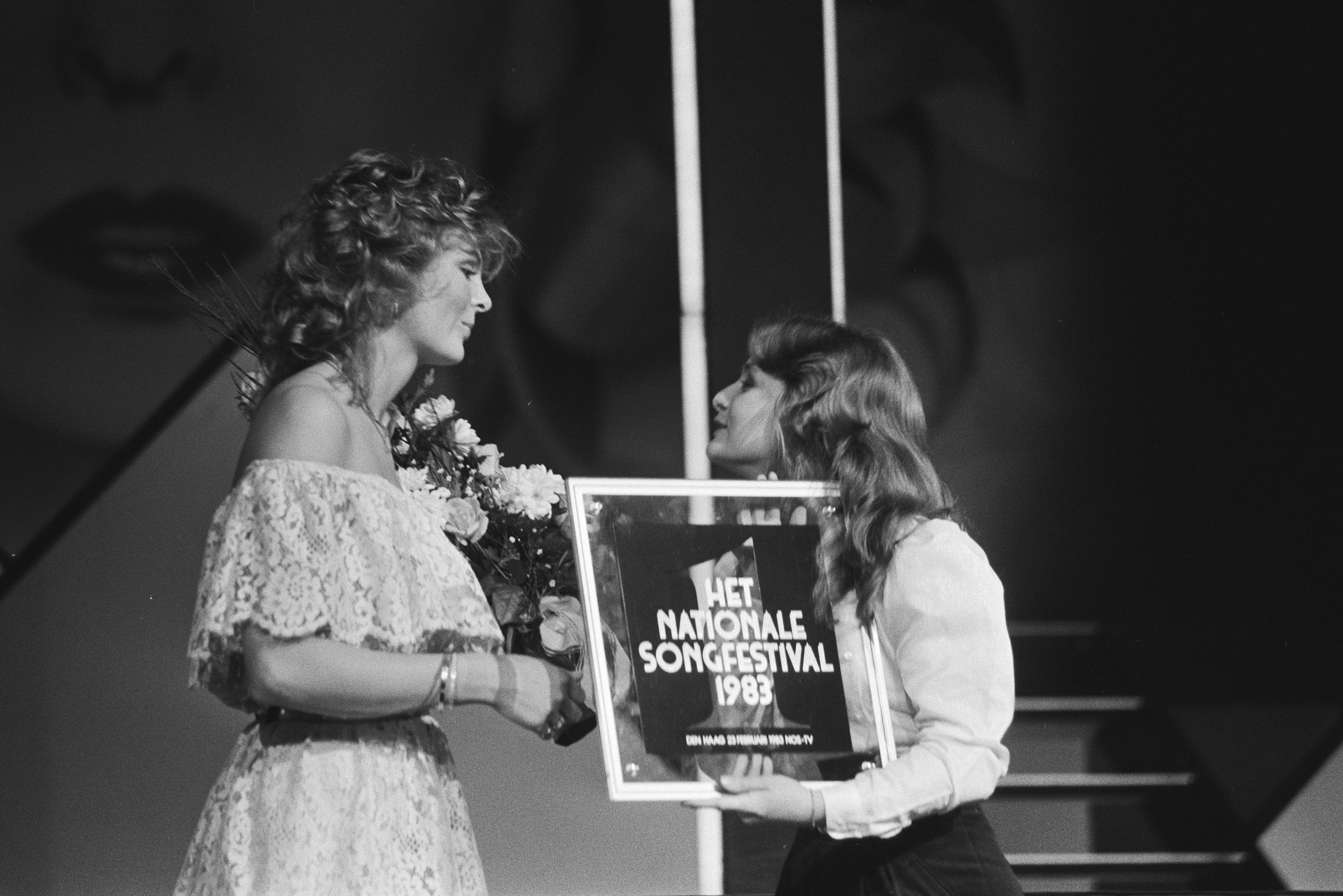 Collectie / Archief : Fotocollectie Anefo Reportage / Serie : Finale van het Nationaal Songfestival 1983 in Den Haag Beschrijving : Winnares Bernadette (l) wordt gefeliciteerd door de Duitse zangeres Nicole Datum : 23 februari 1983 Locatie : Den Haag, Zuid-Holland Trefwoorden : muziek, muziekprijzen, songfestivals, zangers Persoonsnaam : Hohloch, Nicole , Kraakman, Bernadette Instellingsnaam : Nationaal Songfestival Fotograaf : Antonisse, Marcel / Anefo Auteursrechthebbende : Nationaal Archief Materiaalsoort : Negatief (zwart/wit) Nummer archiefinventaris : bekijk toegang 2.24.01.05 Bestanddeelnummer : 932-5149